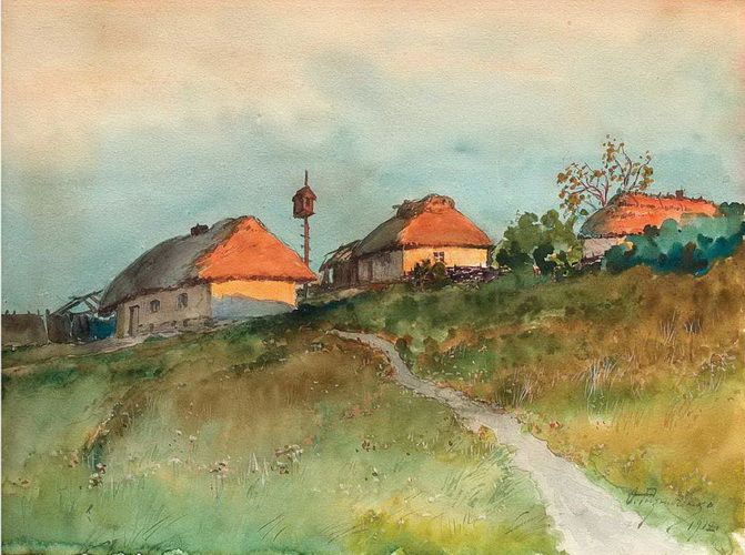 Картина «Стежина до хати», 1912 р., картон, акварель; 27,5х36,5 Різниченко Федір Петрович (1865 - 1922)